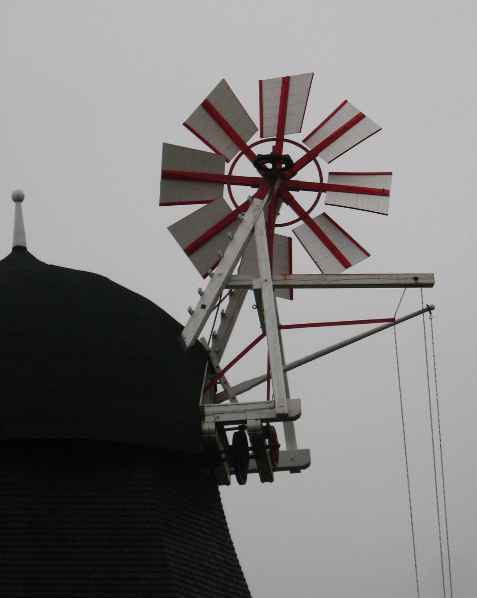 Grubbe Vindmölle, Vindrosen Grubbe Møllegyden2 - 5600 Faaborg Eget foto, Noorse Licentie: CC-BY-SA-3.0 Forminsket versjon for Wikipedia